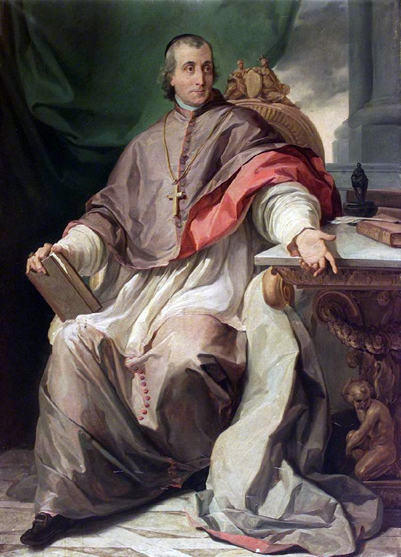 Francesco Coghetti, Ritratto del vescovo Carlo Gritti Morlacchi', 1832 Tecnica: olio su tela Dimenisioni: cm 200.0x130.0 (HxL)